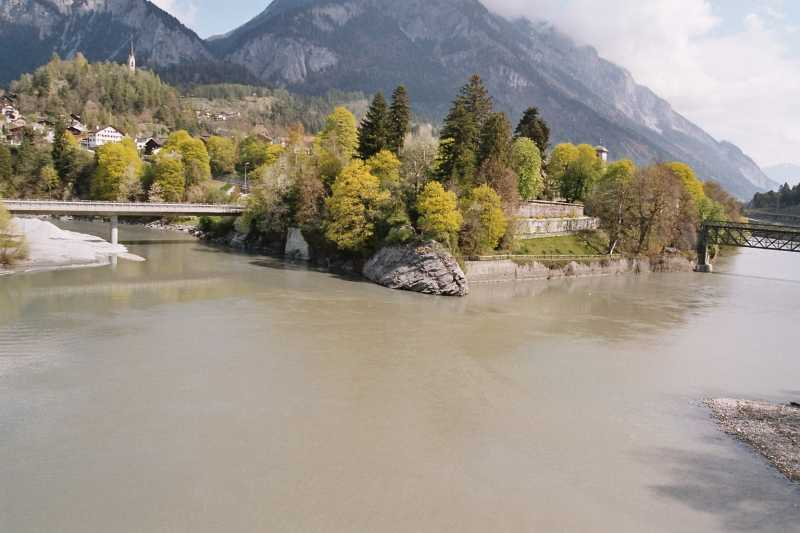 Zusammenfluss von Vorder- und Hinterrhein bei Reichenau in der Schweiz